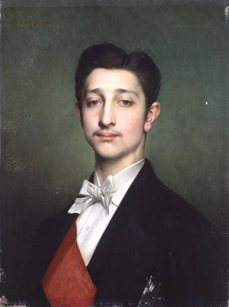 Portrait de Louis-Napoléon Bonaparte (1856-1879), huile sur toile de Jules Lefebvre, Château de Versailles, 1874.